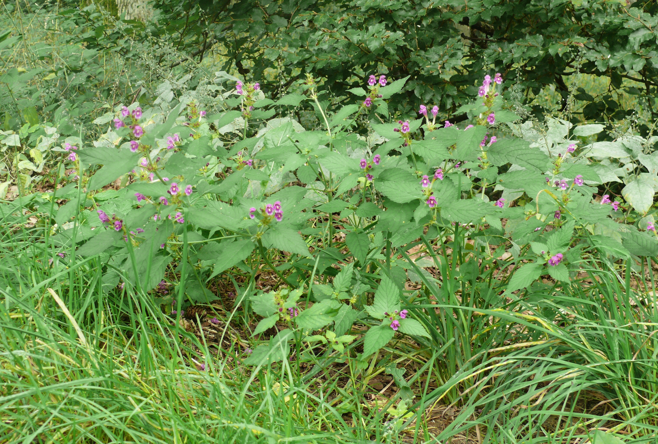 Galeopsis pubescens, Nördlinger Ries, Deutschland